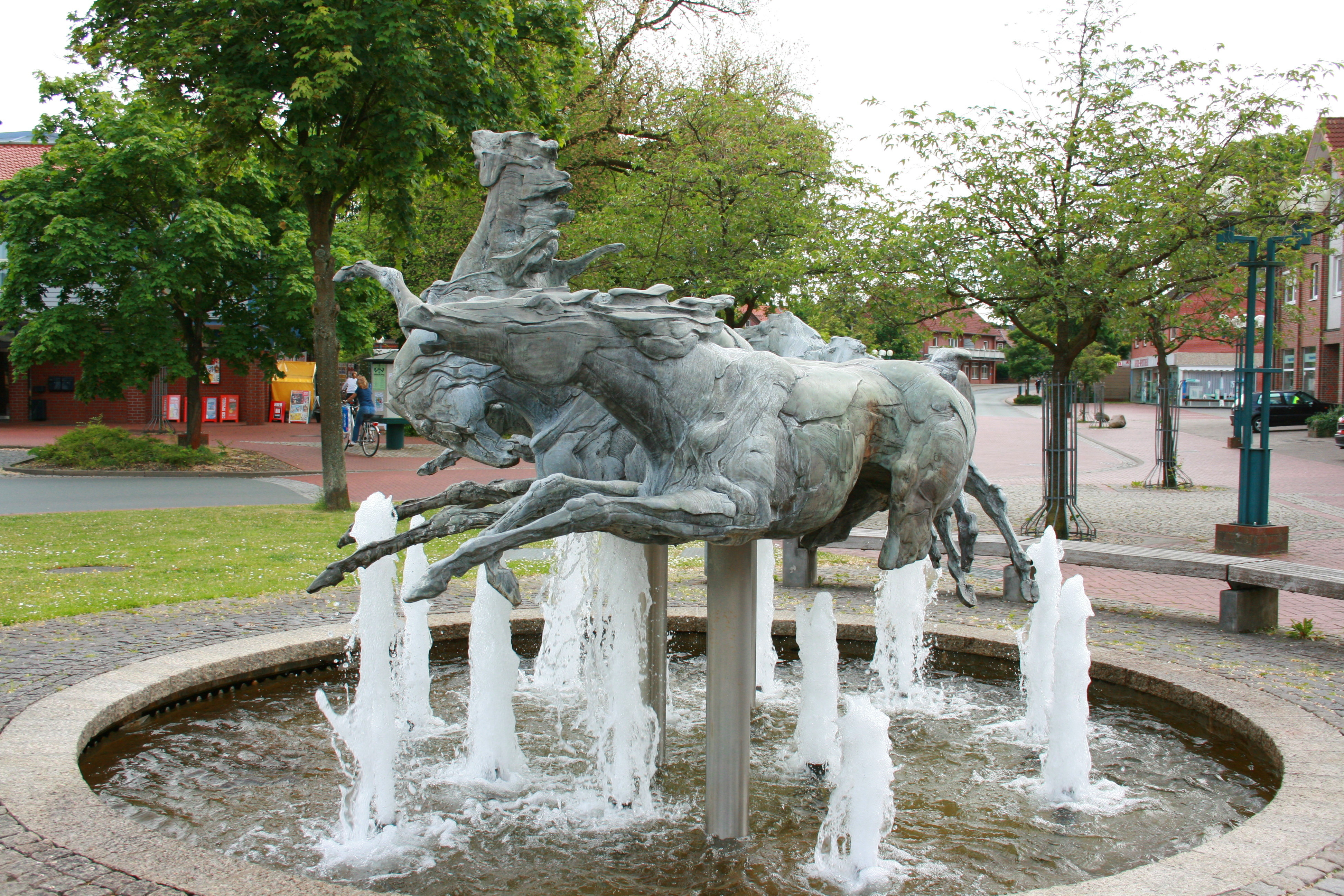 Niedersachsenbrunnen in Munster (Örtze)